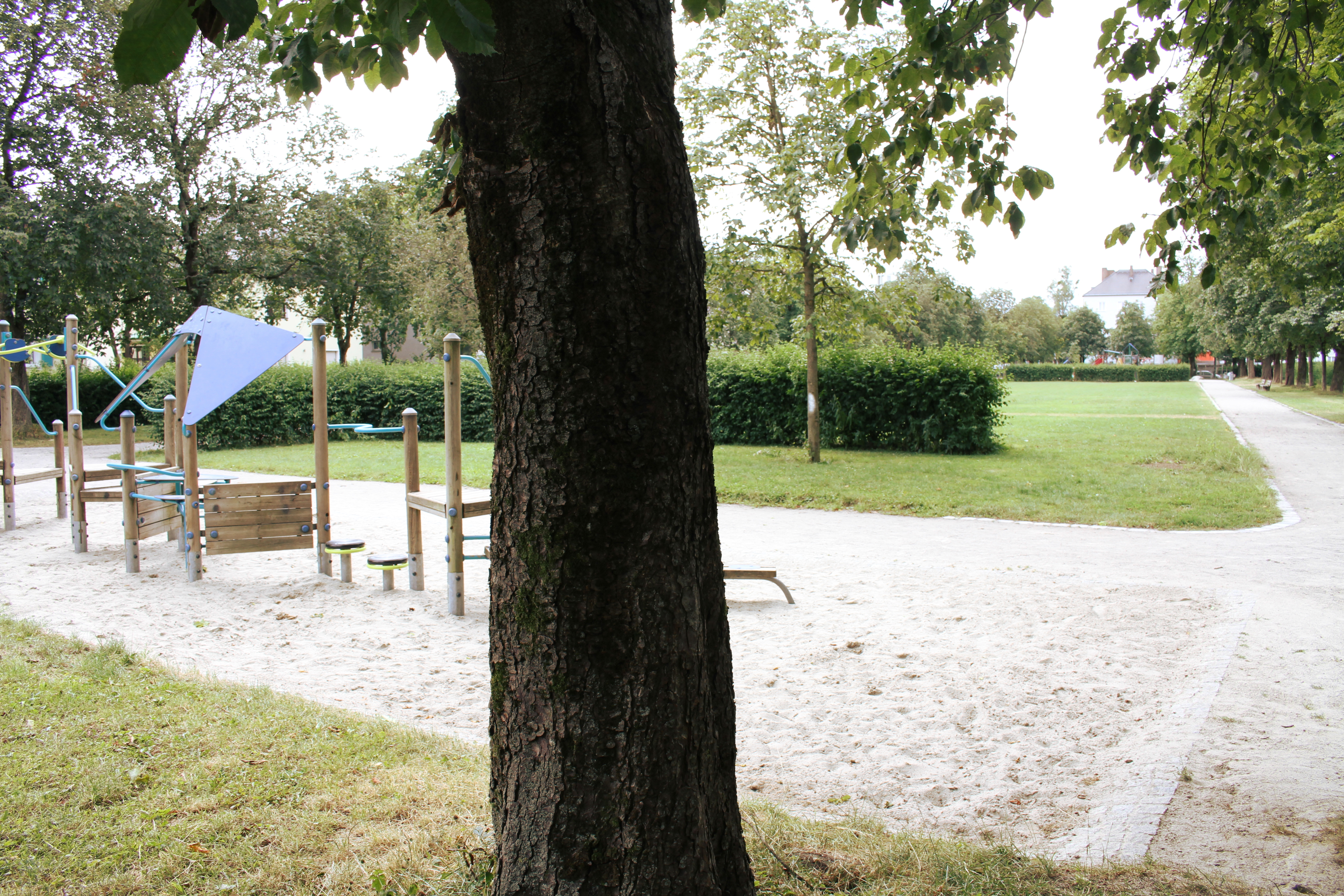 Eichendorffplatz, Sendling-Westpark, München. Ein für Sendling-Westpark typischer Quartiersplatz. Mit zwei Spielplätzen und Spiel- und Liegewiese dazwischen.